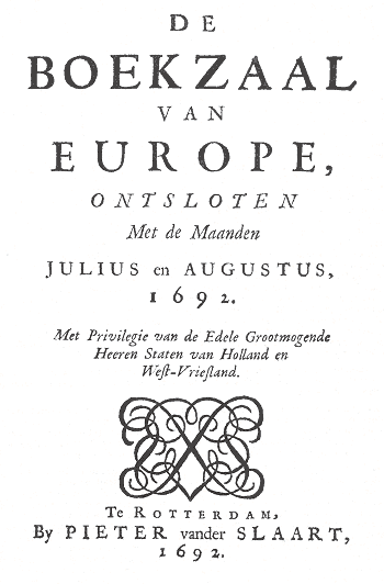 DE BOEKZAAL VAN EUROPE, ONTSLOTEN Met de Maanden JULIUS en AUGUSTUS 1692. Met privilegie van de Edele Grootmogende Heeren Staten van Holland en West-Vriesland. Te Rotterdam, By PIETER vander SLAART, 1692.